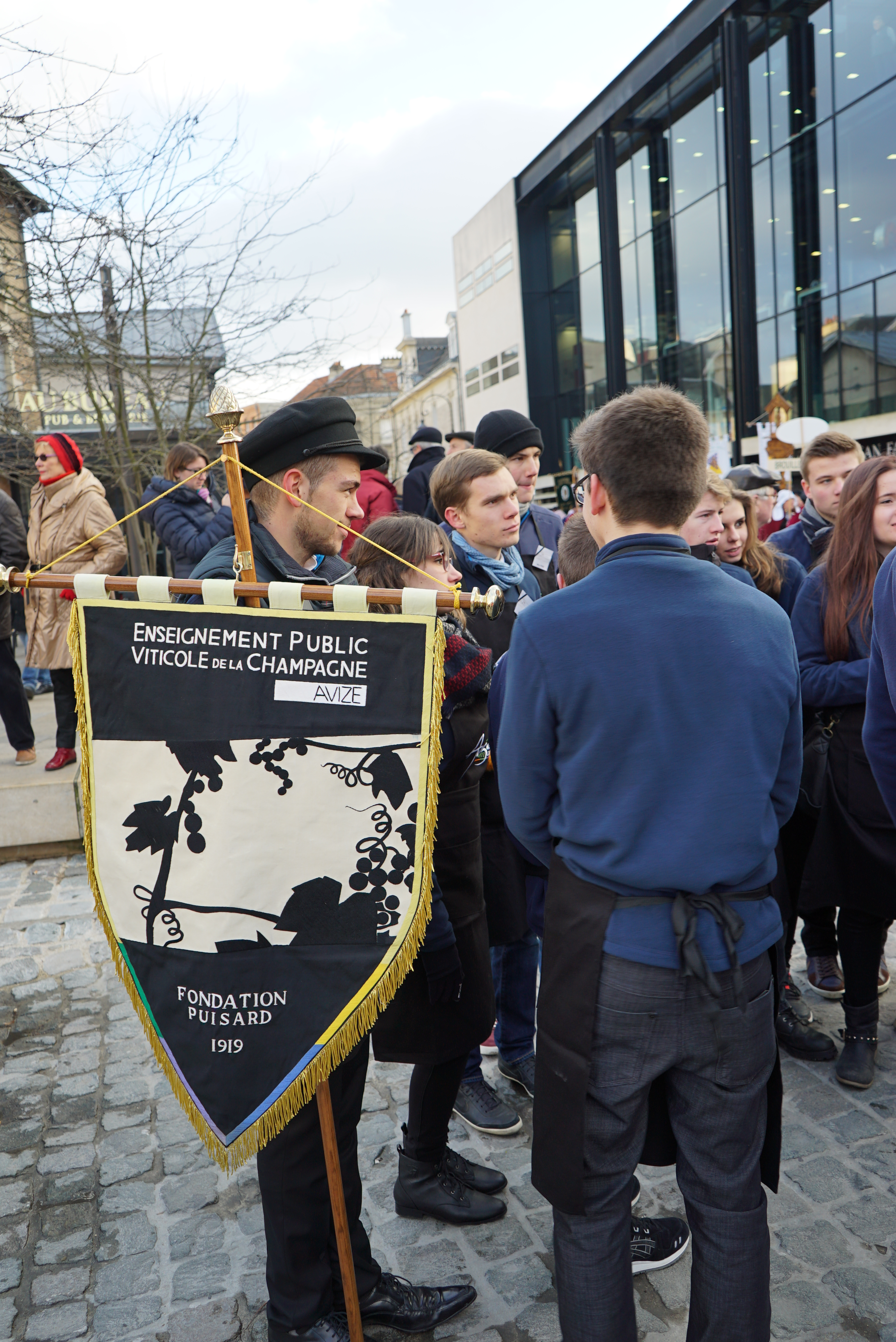 lors de la procession de la Fête de la st-Vincent 2016 en Champagne. le lycée viti-vinicole de la ville d'Avize.